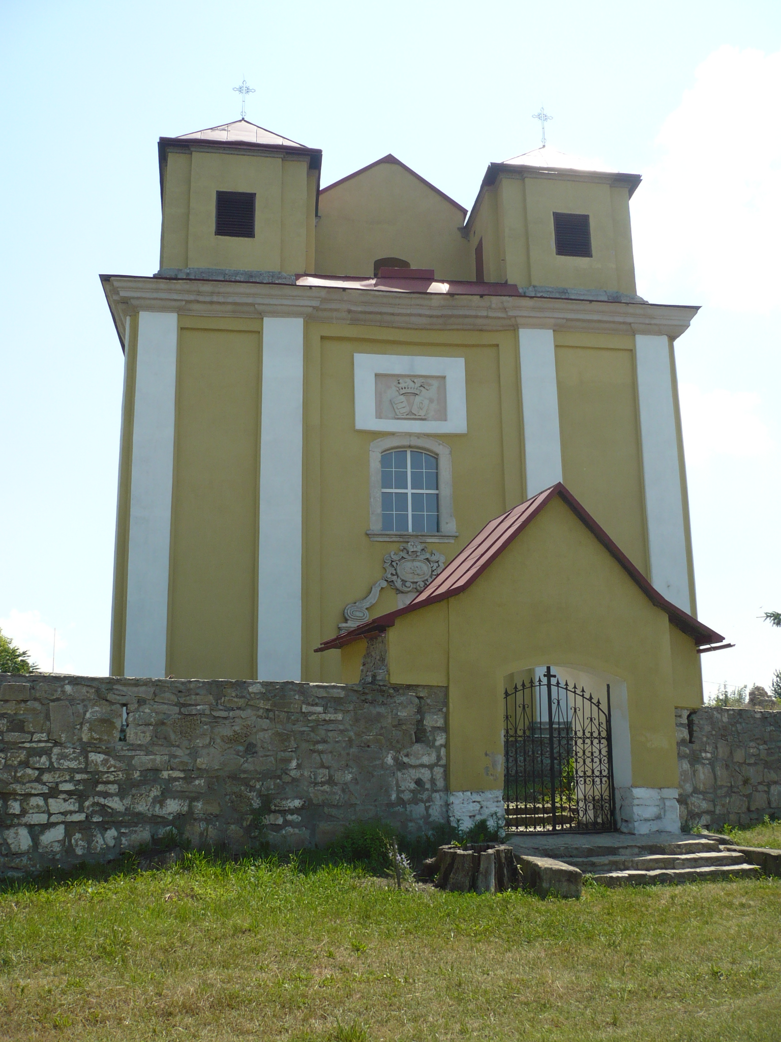 Kościół ormiański pw. Niepokalanego poczęcia NMP